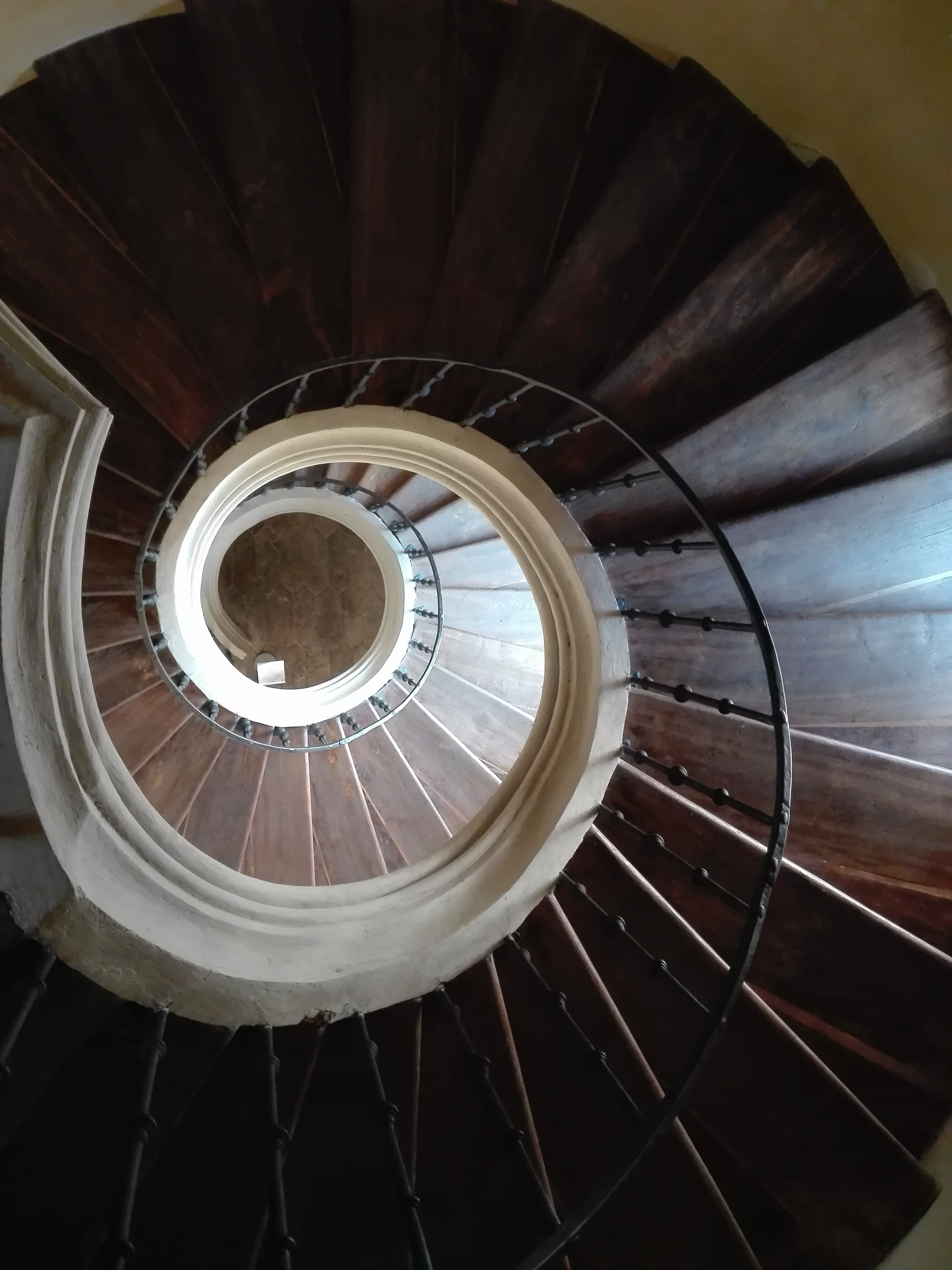 Schodiště v kostele Nanebevzetí Panny Marie a svatého Jana Křitele